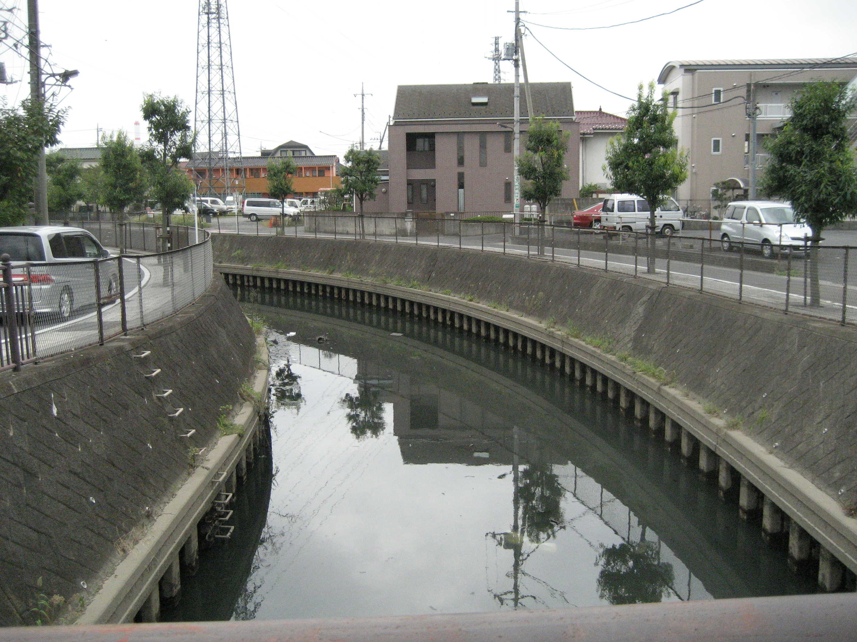 辰井川（埼玉県草加市）